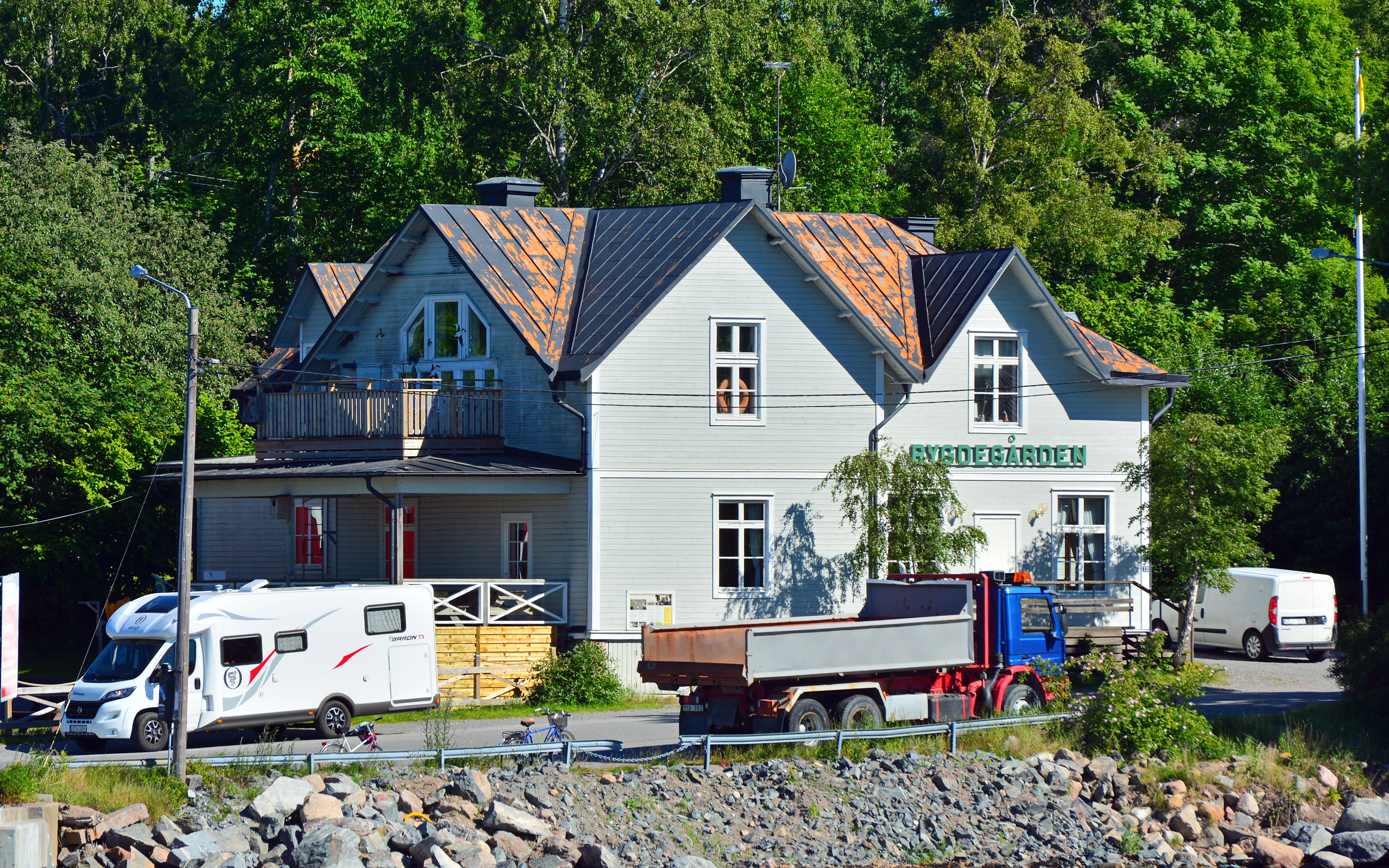 Gräddö bygdegård på Rådmansö i Stockholms norra skärgård.